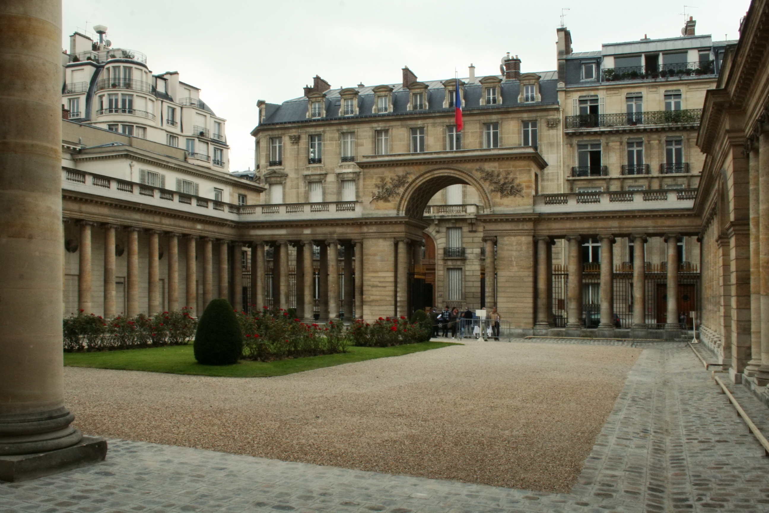 Cour de l'Hôtel de Salm, pendant les journées du Patrimoine 2007.